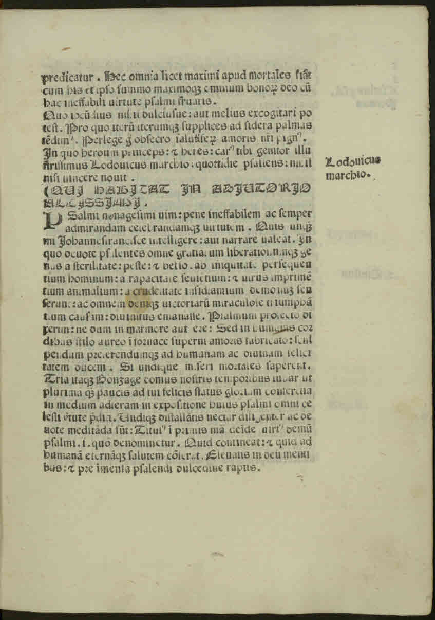 Commento volgare e latino de salmo 90. (Qui habitat in adiutorio Altissimi). - [Pavia] : [Cristoforo Cani], [circa 1495]. - 24 c. ; [a¹⁰, b⁸, c⁶] ; 4º .